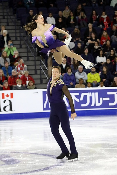 Эвелин Уолш и Треннт Мишо на этапе Гран-при Skate Canada 2018